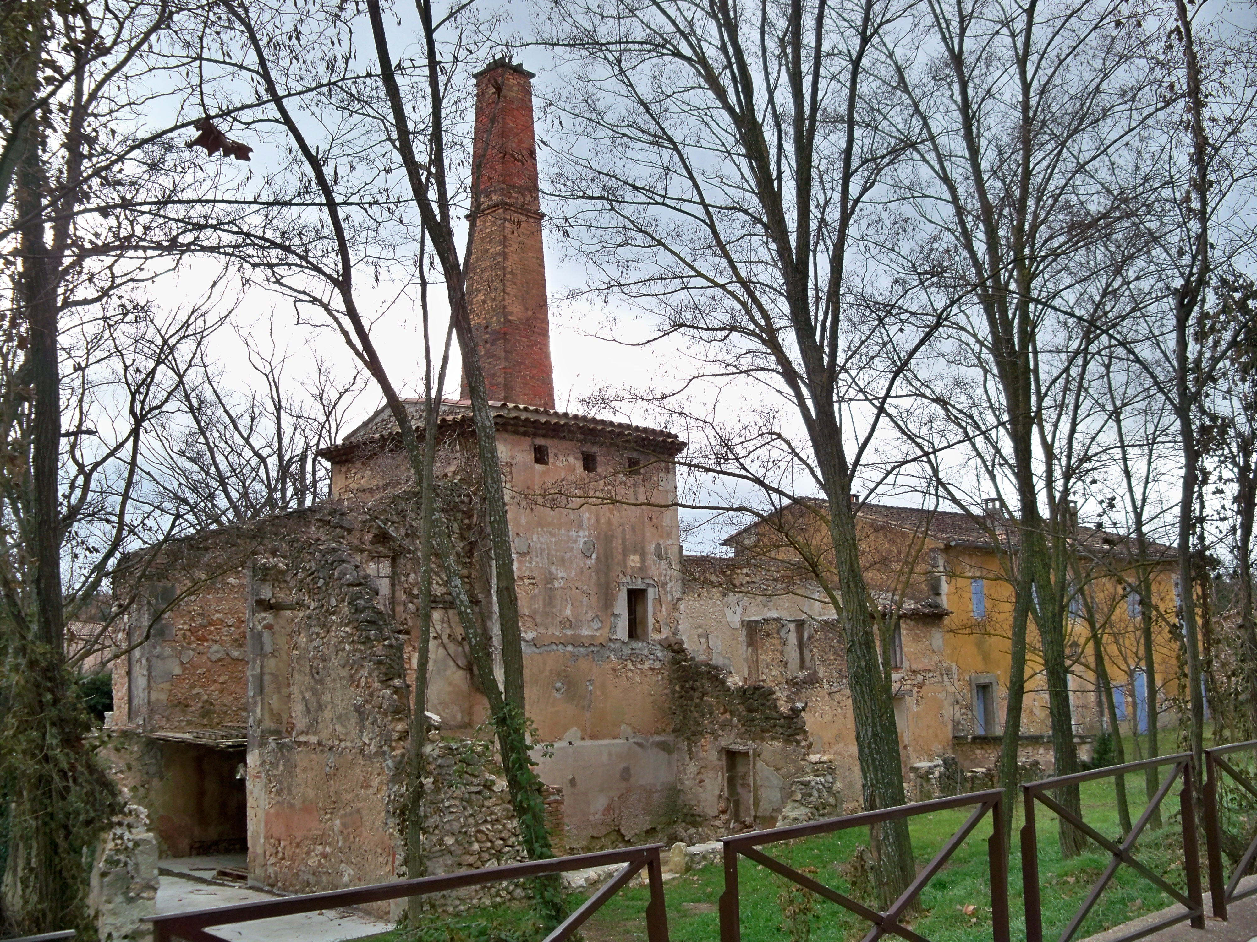 Tuilerie du hameau des Chênes, Commune d'Apt, Vaucluse, France